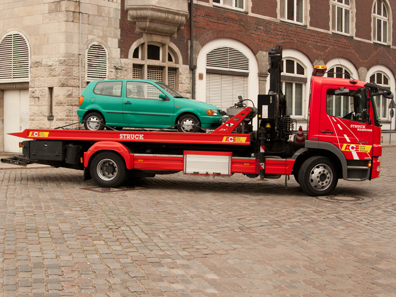 ACE-Abschlepper